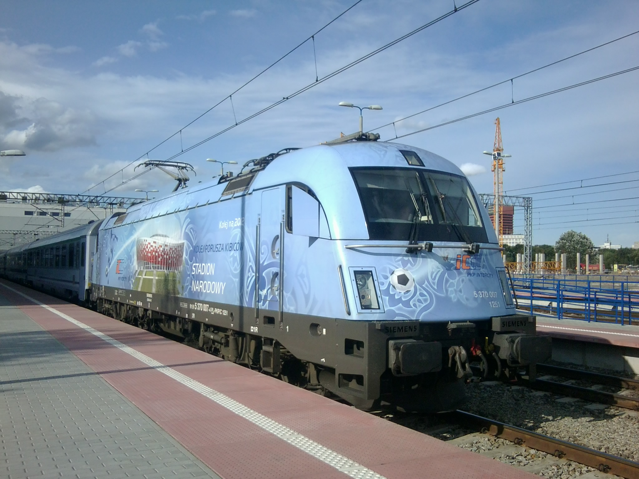 Lokomotywa EU44 oklejona w barwy stadionu Narodowego w Warszawie na czas trwania EURO 2012.